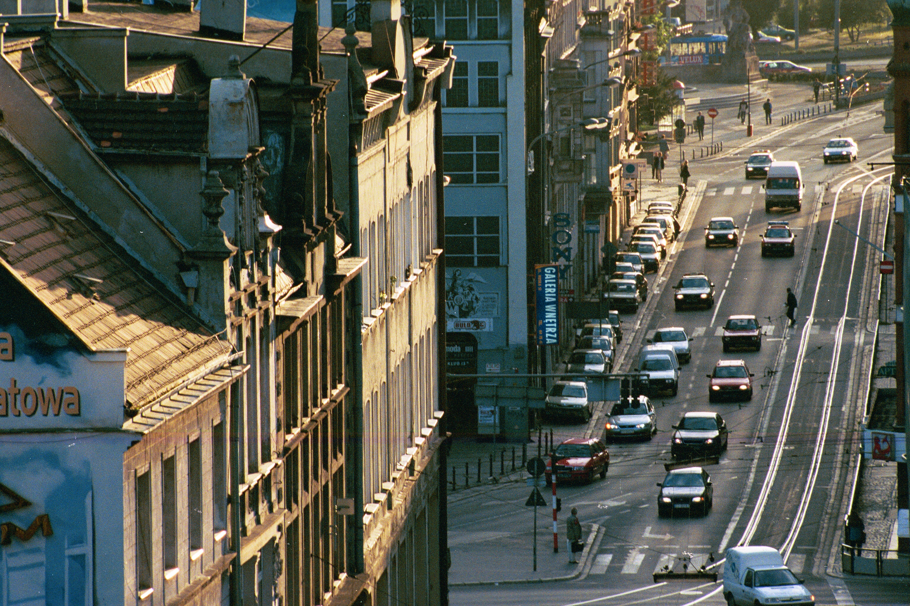 ulica Ruska we Wrocławiu widziana z tarasu budynku przy pl. Solnym